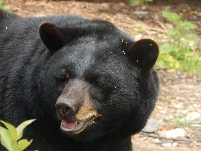 Ours noir se trouvant au zoo de Montréal